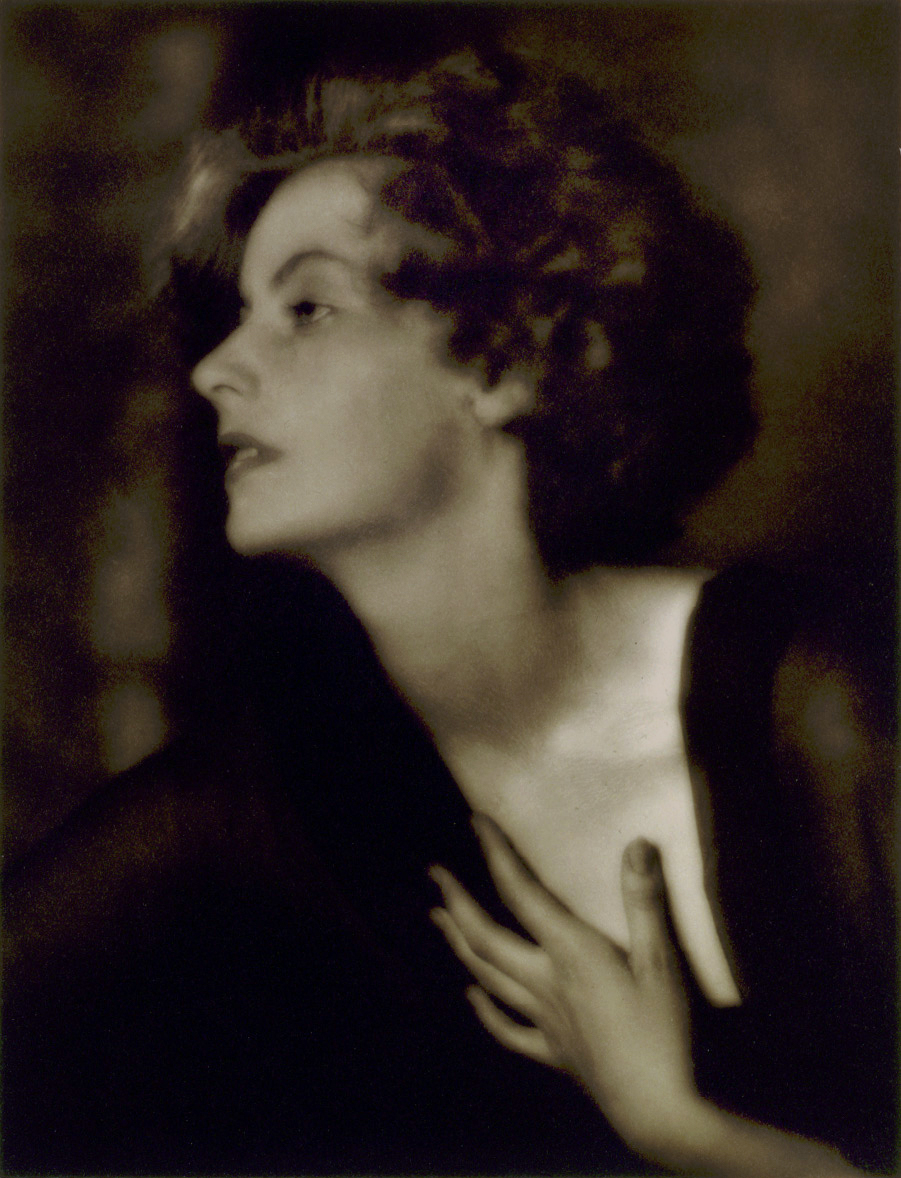 Greta Garbo, actress.